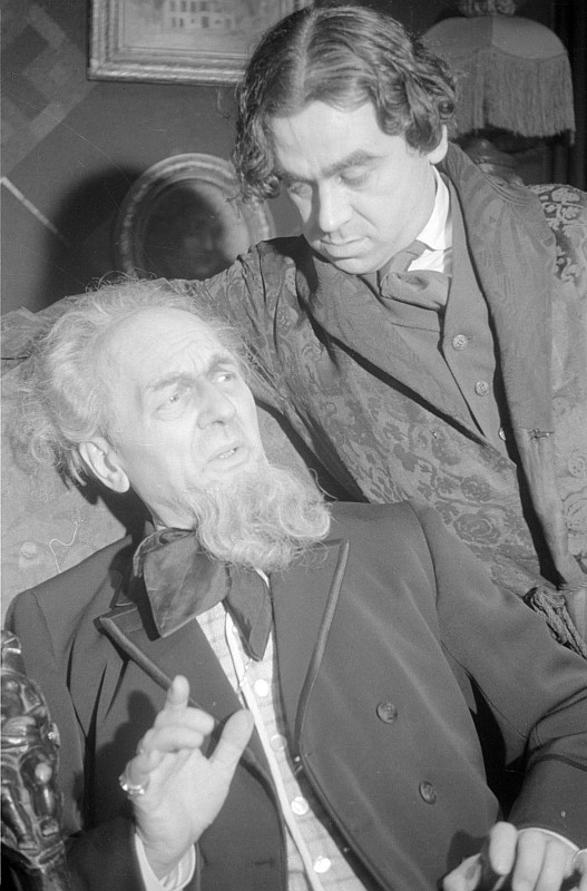 Original image description from the Deutsche Fotothek Paul Bildt als Prof. Serebrjanow, Paula Denk als Helena Andrejewna, seine Gattin, des weiteren Heinrich Greif, Walter Richter als I. P. Wojnitzki und Ruth Schilling